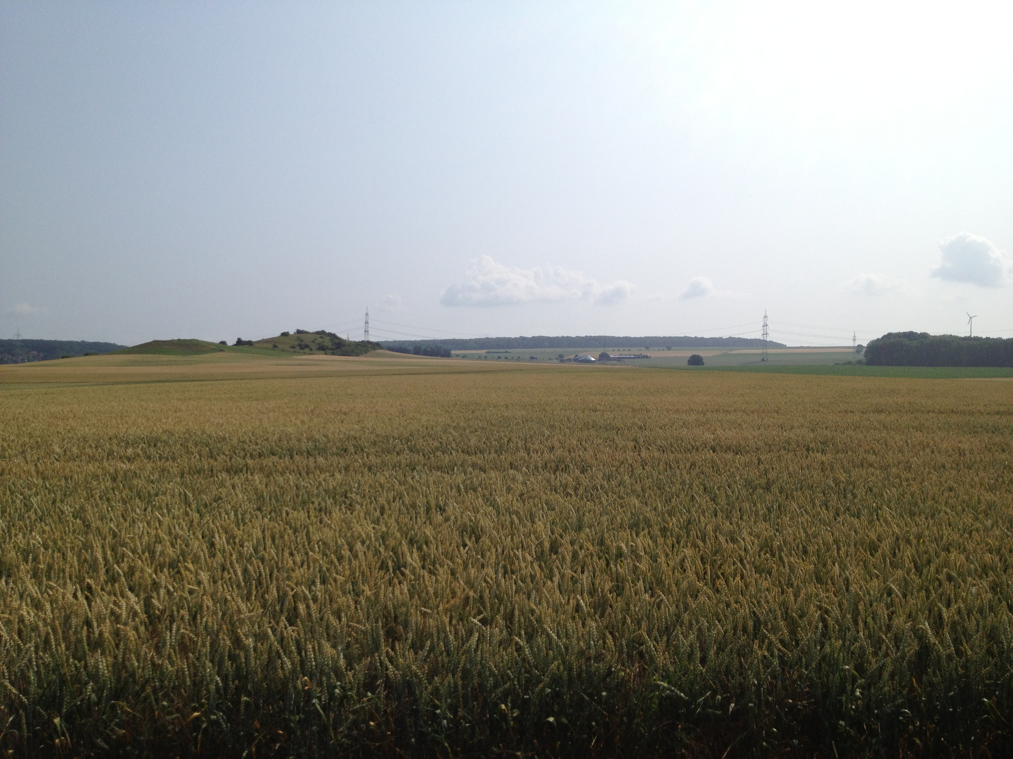 Blick vom Märchenland-Radrundweg auf den Offenberg südlich von Hofgeismar